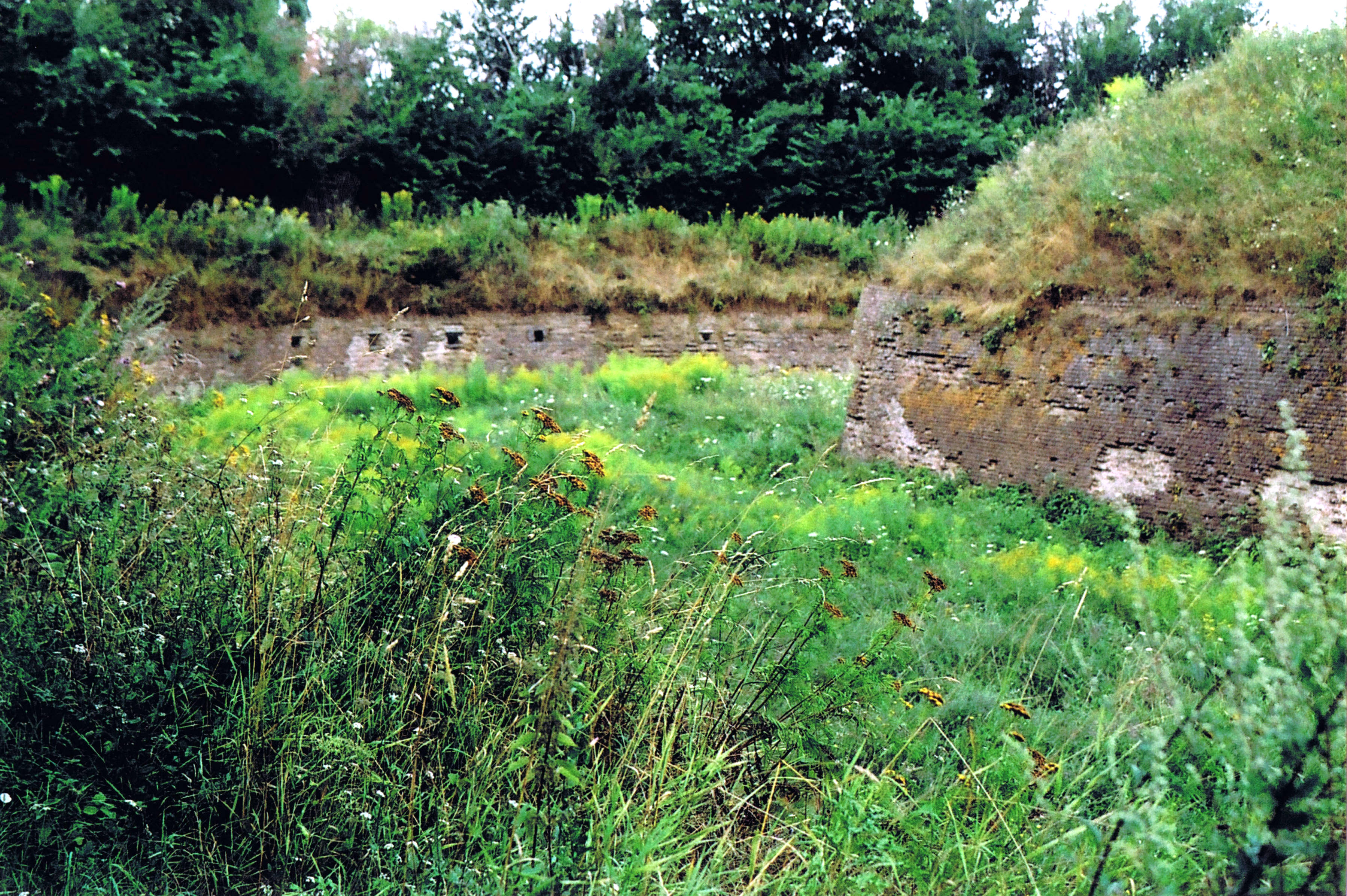 Maastricht 2007 Hoge Fronten